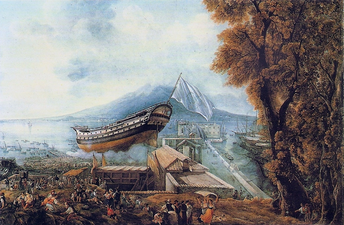 Varo del vascello Archimede (L. Ducros - Museè Cantonal Des Beaux-Arts di Losanna)